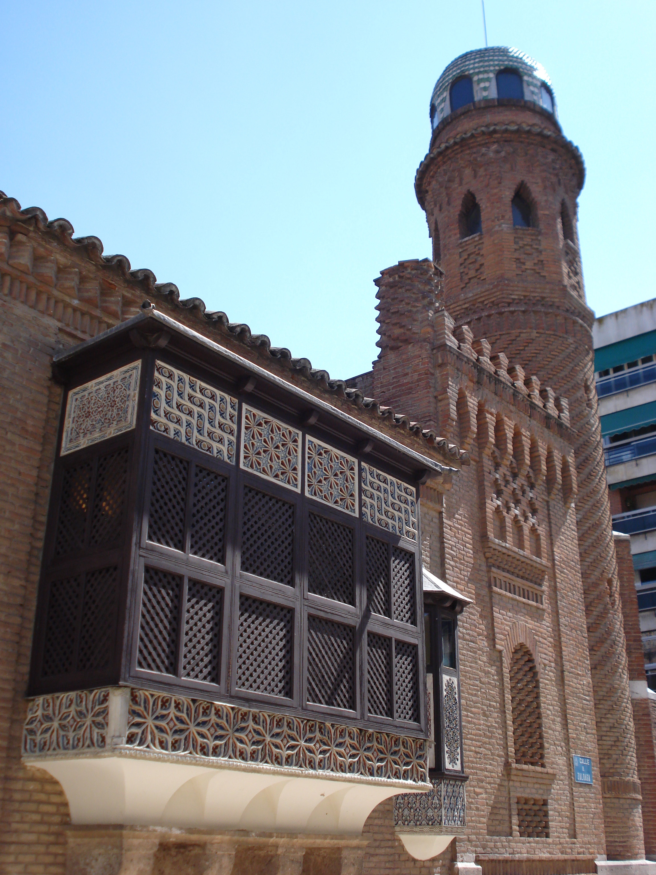 Palacio de Laredo, Alcalá de Henares, España.